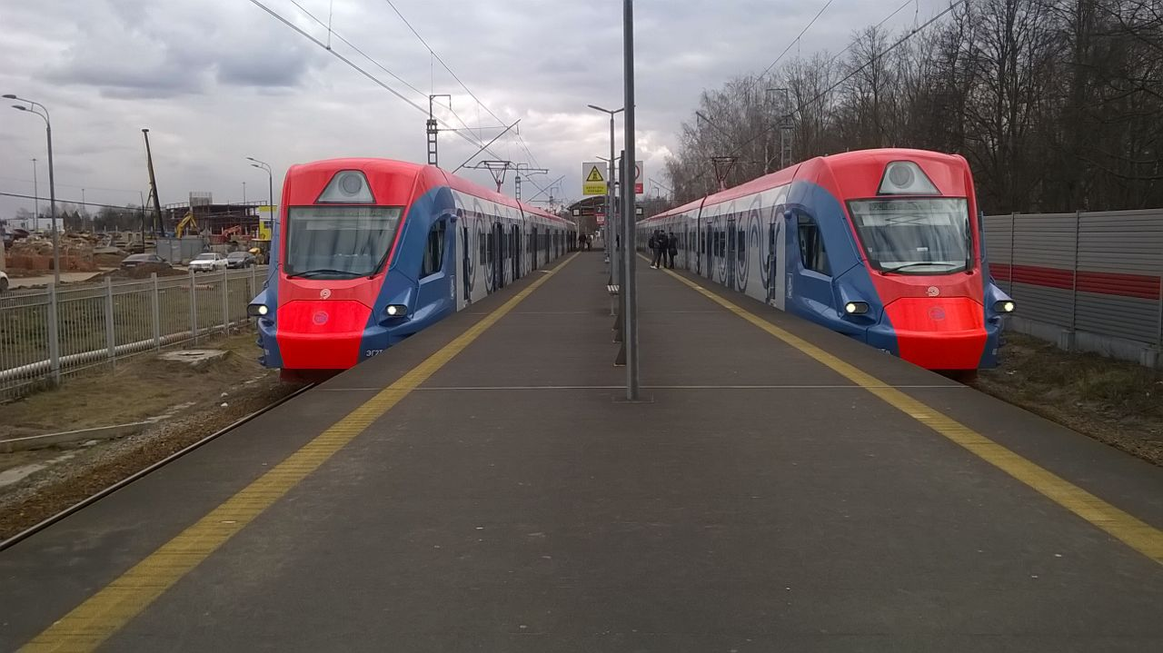 ЭГ2Тв "Иволга" на станции "Новопеределкино".